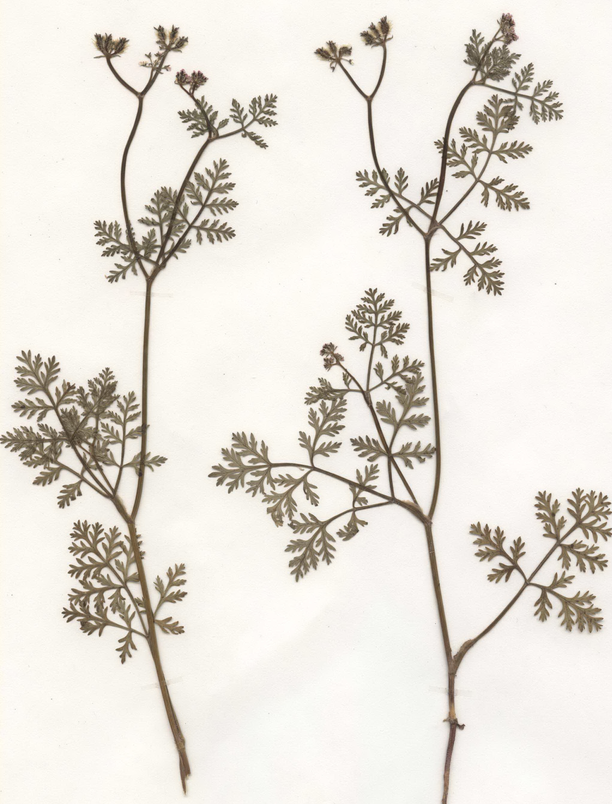 Caucalis platycarpos, eigener Herbarbeleg von 1985, Unterfranken (Die Art sollte wegen ihrer Gefährdung und Seltenheit nicht gesammelt werden!)